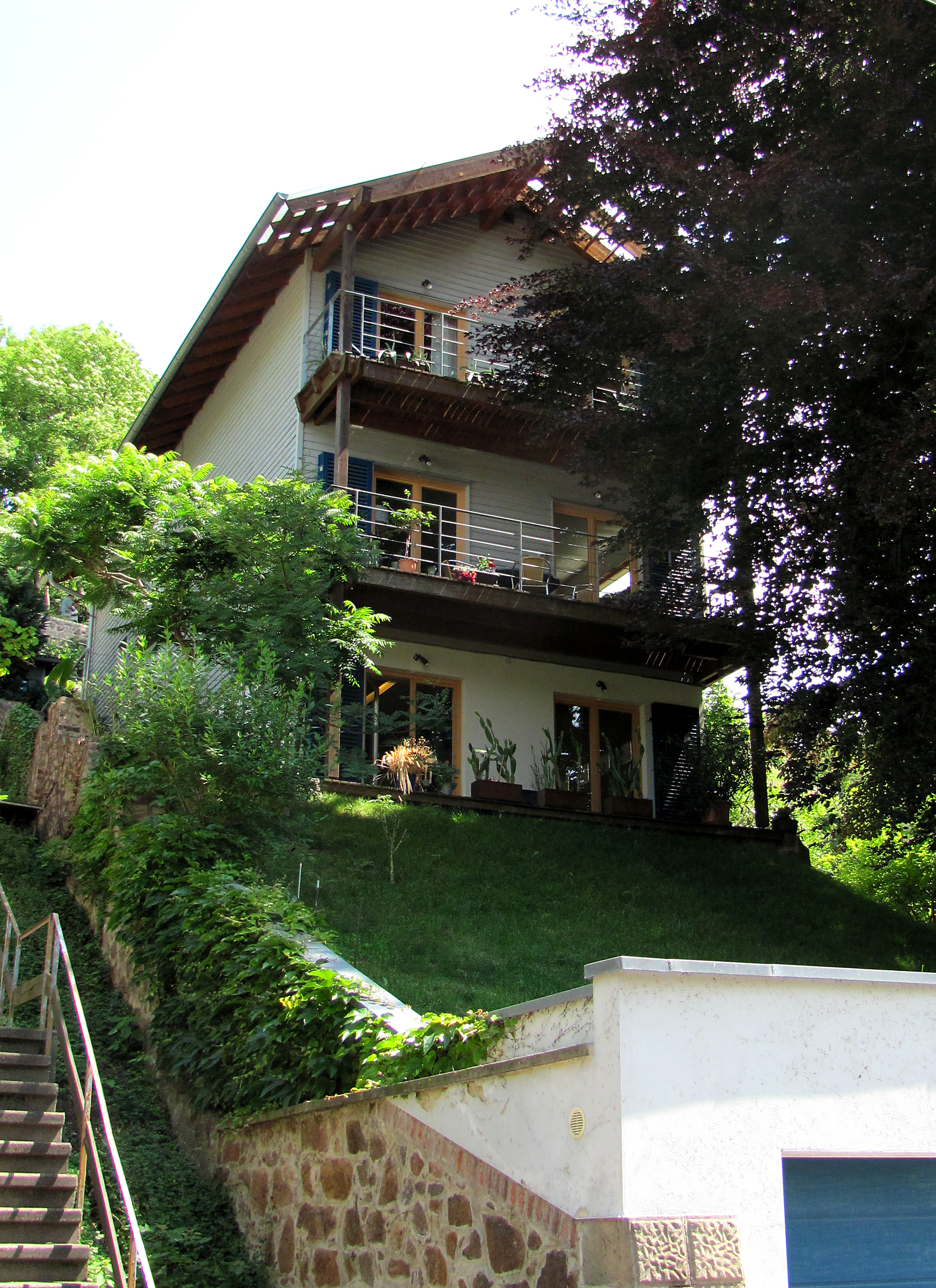 Radebeul, Villa Obere Bergstraße 84